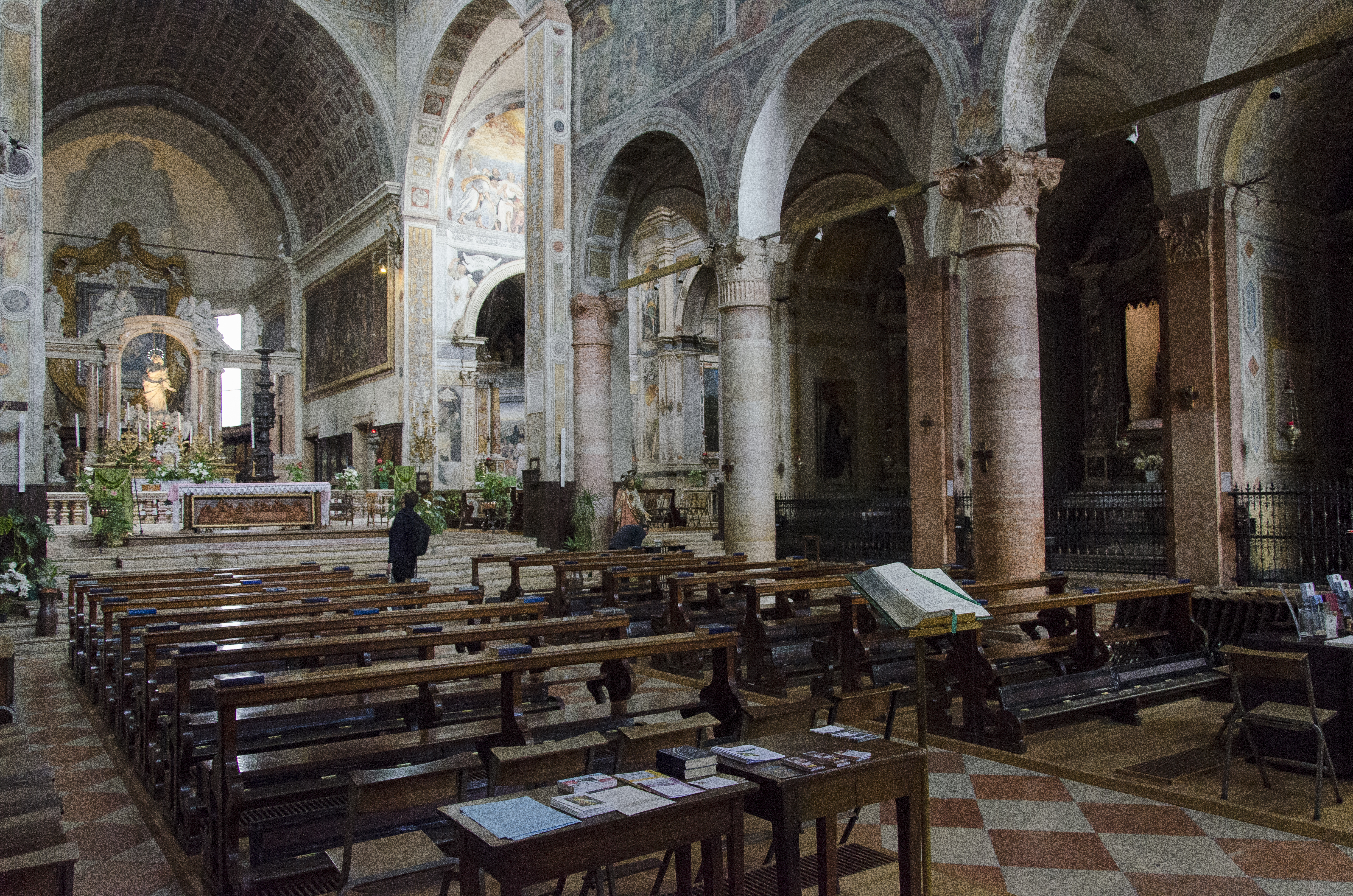 Veduta dell'interno